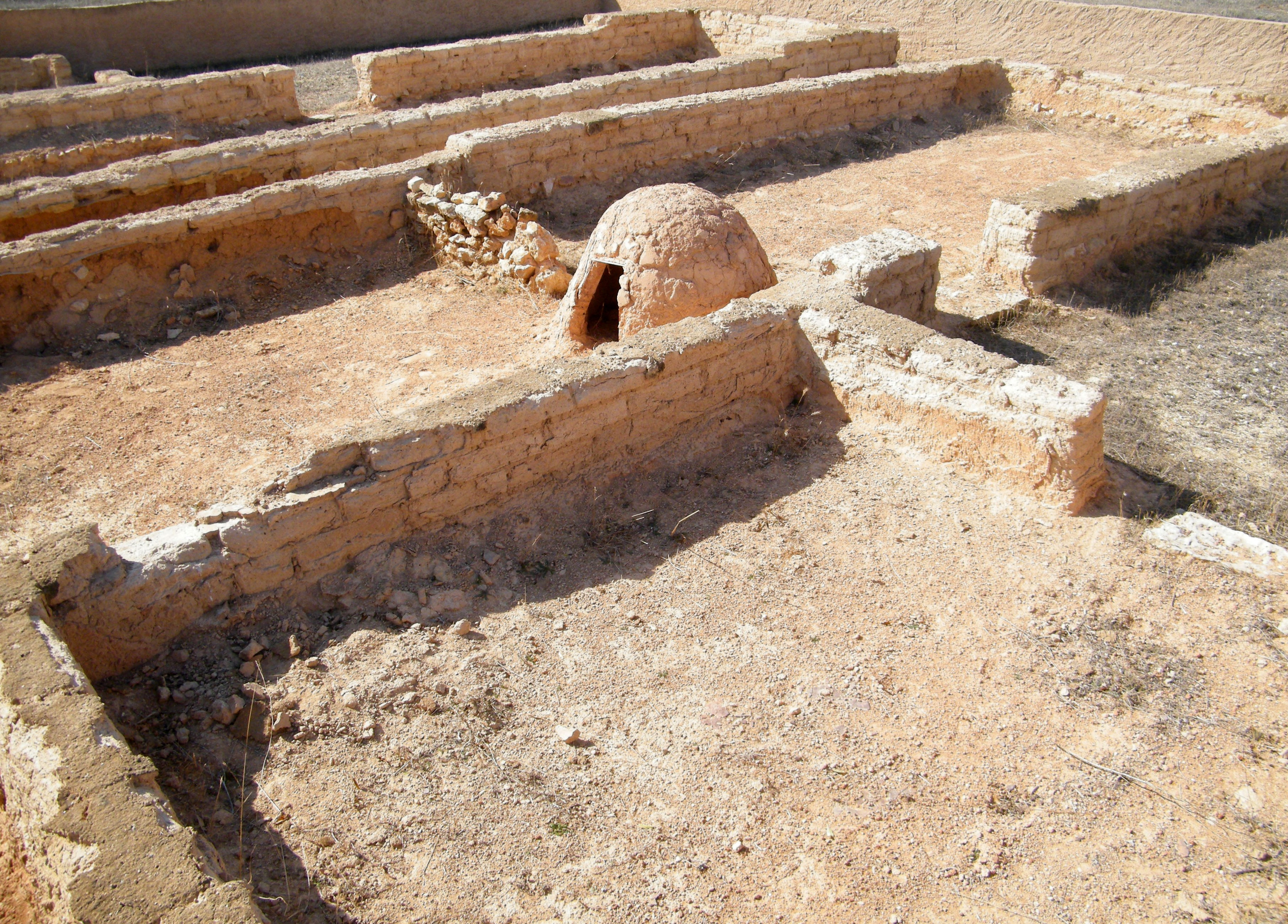 Horno moruno situado entre restos de zócalos de muros de tiendas y casas iberas. VII Jornada de puertas abiertas del recinto arqueológico de Kelin. Paraje los Villares, Caudete de las Fuentes, Valencia.